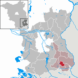 Döbern in Brandenburg (Country) - District Spree-Neiße